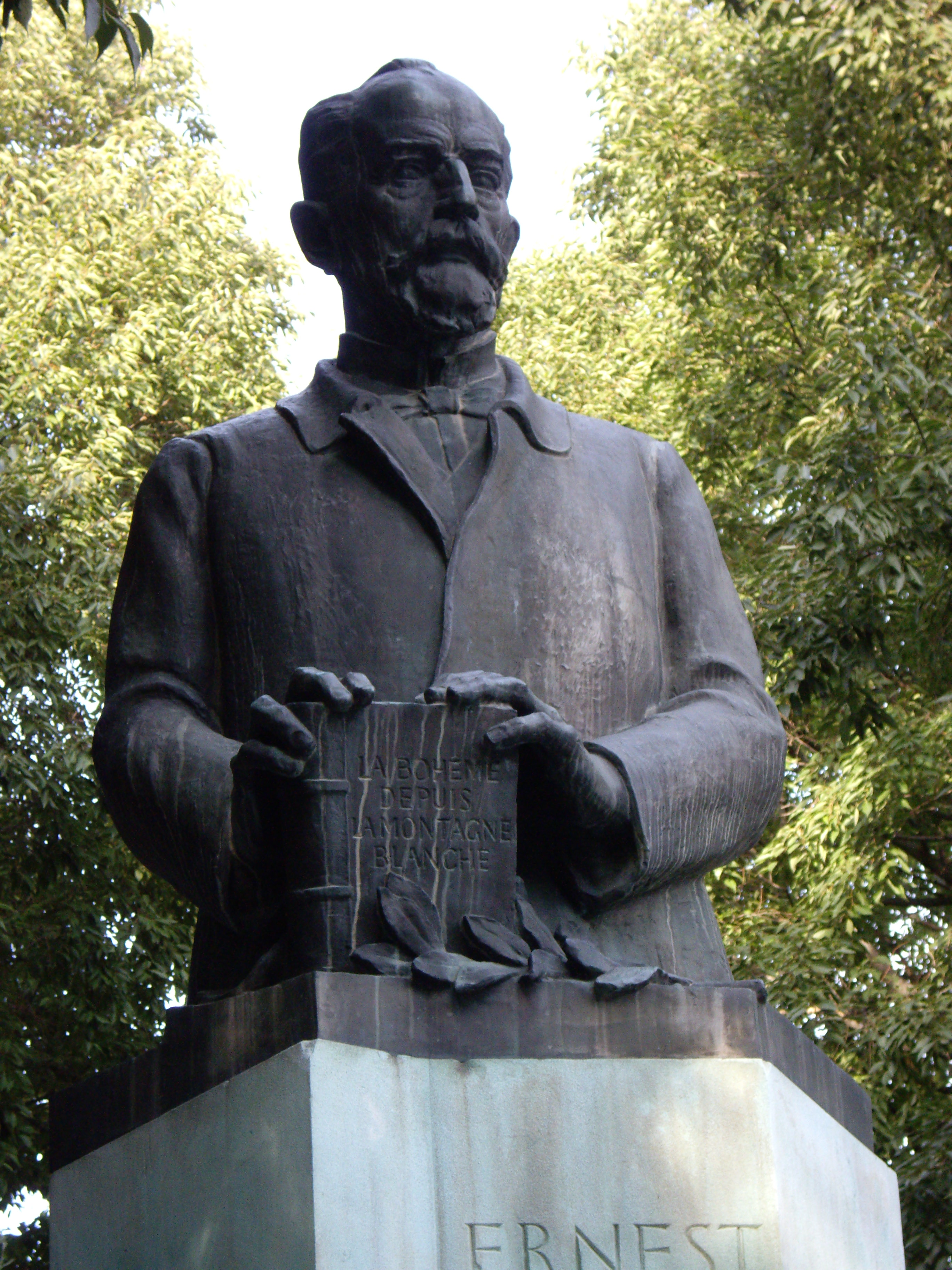 Statue de l'historien français spécialiste de l'Allemagne et de la Bohême Ernest Denis (1849-1821)